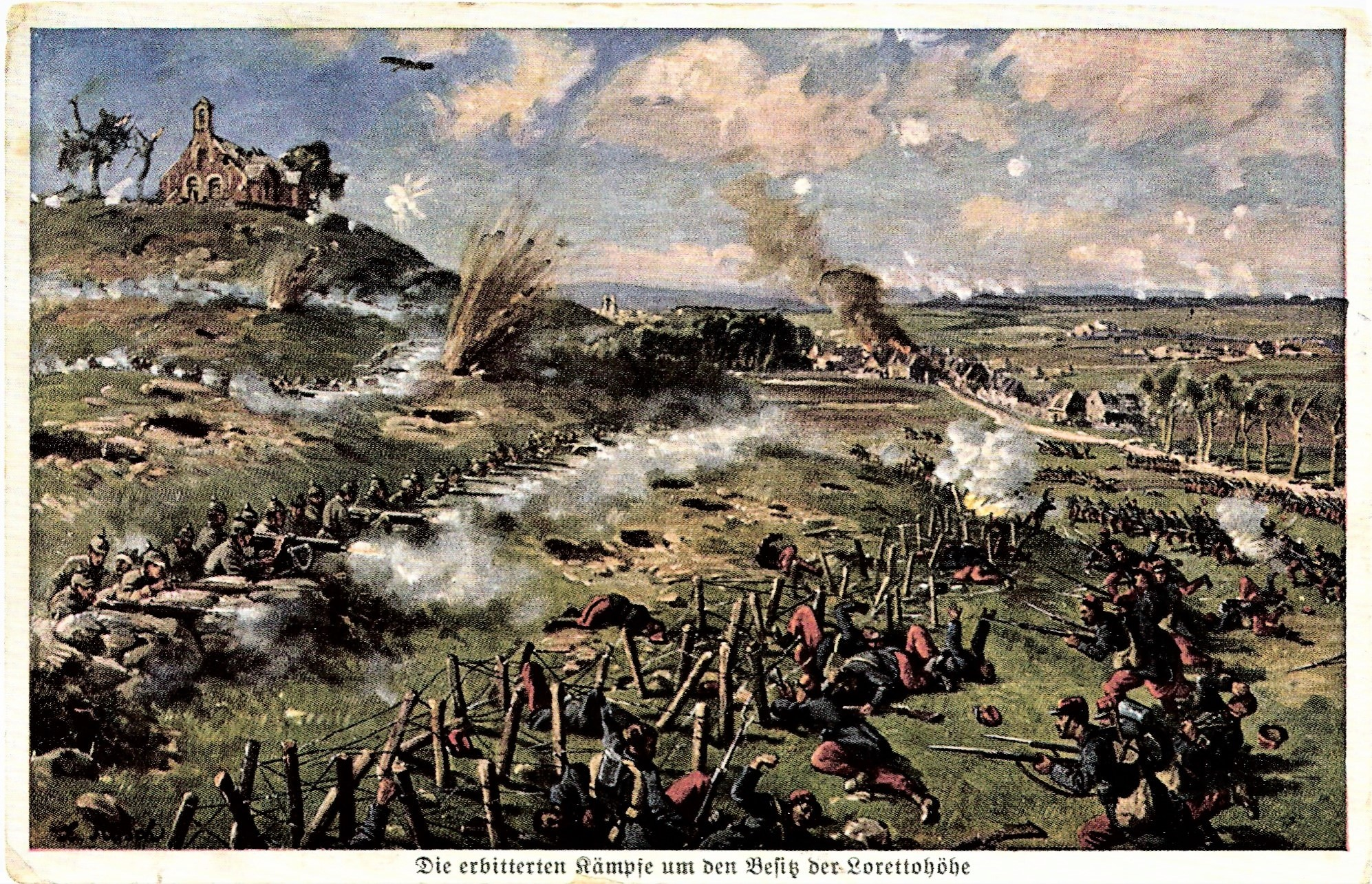 Die erbitterten Kämpfe um den Beistz von Lorettohöhe. Kunstpostkarte